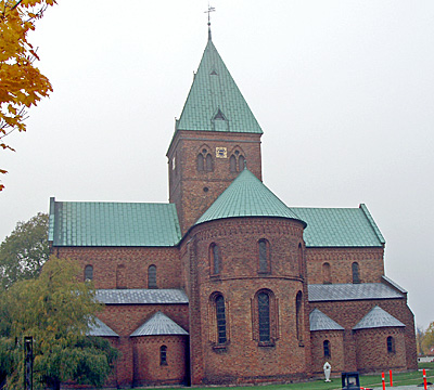 Skt. Bendts Kirke ligger midt Ringsted.(Ringsted Herred er et herred i Sorø Amt.